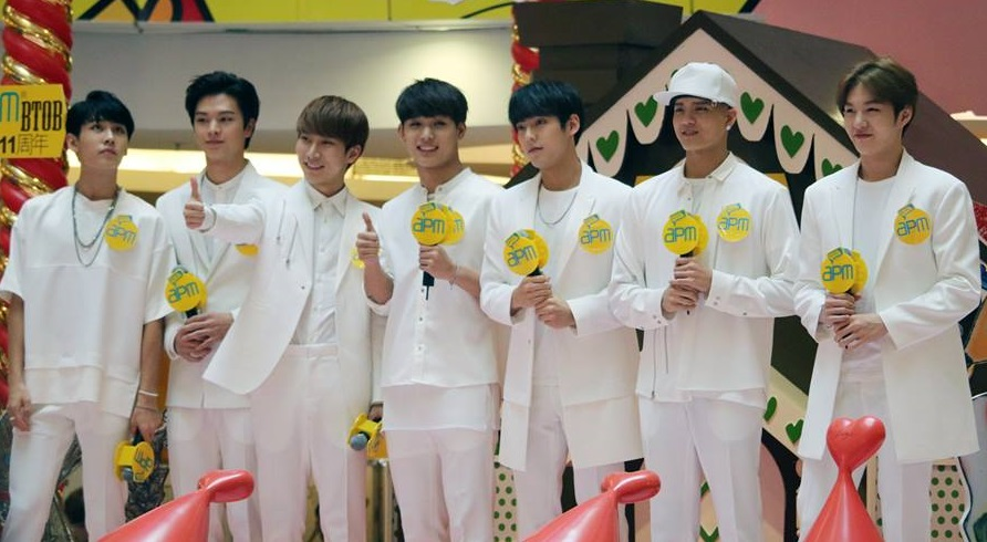 BTOB HK 2015.09.06 香港APM商場活動